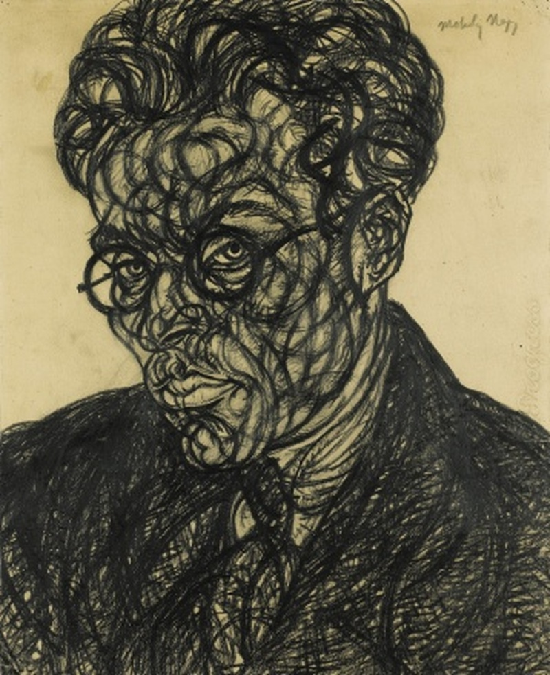 László Moholy-Nagy: Self Portrait, 1918. Wax crayon on paper. 37.9 x 31 cm